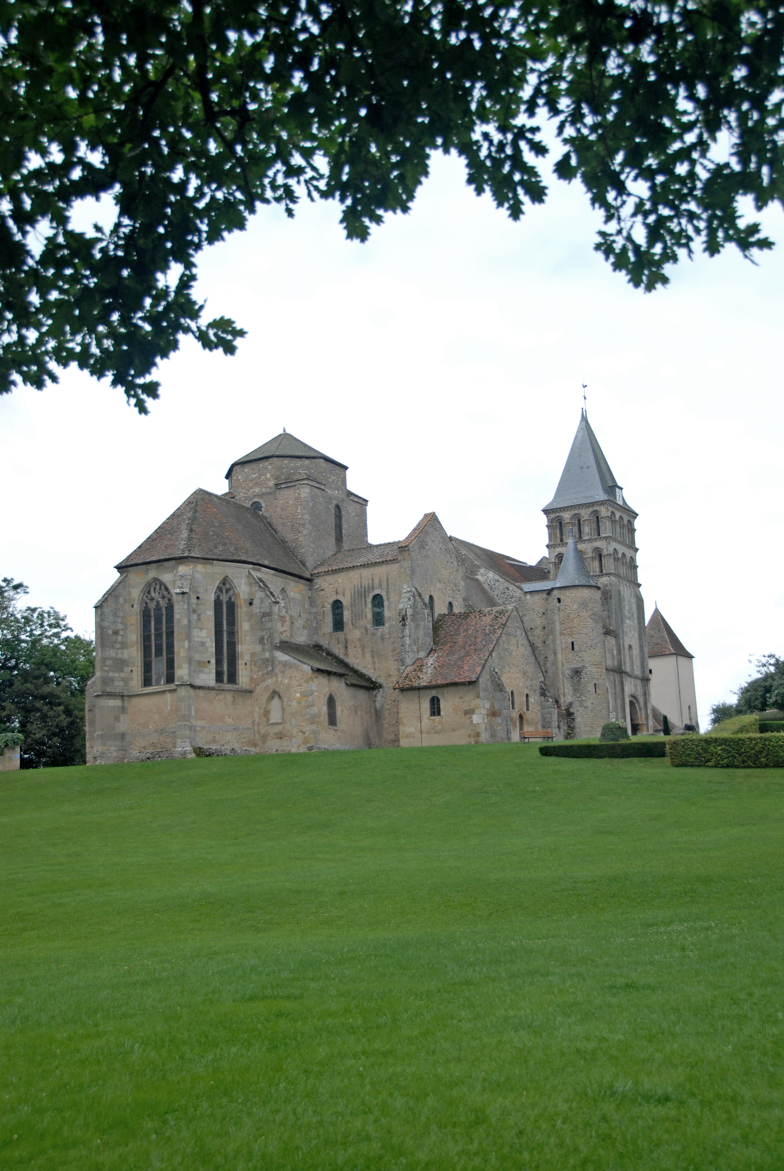 Prioratskirche von N, davor ehemaliger Großer Garten